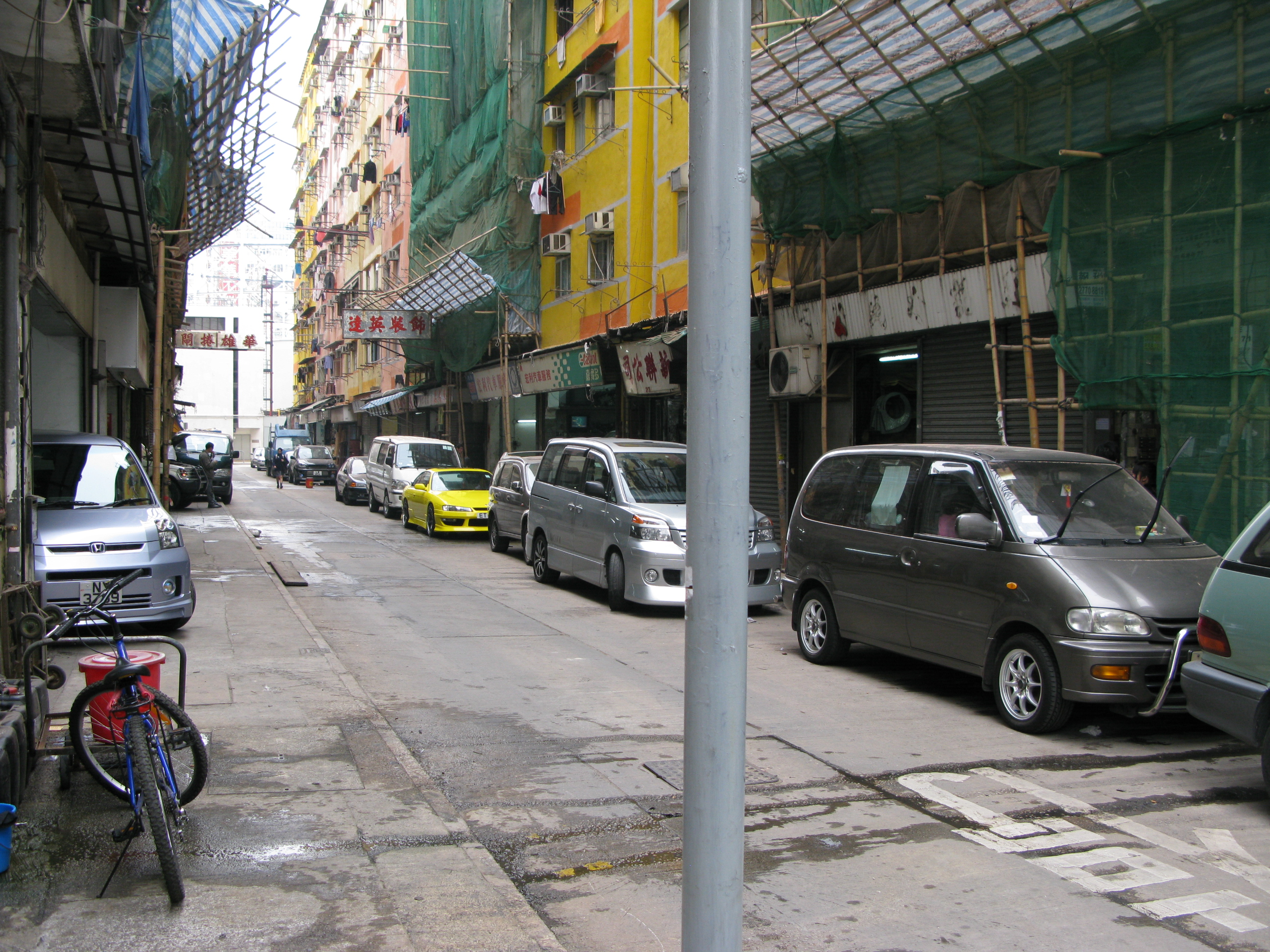 中文（香港）: 香港九龍土瓜灣十三街鴻運街